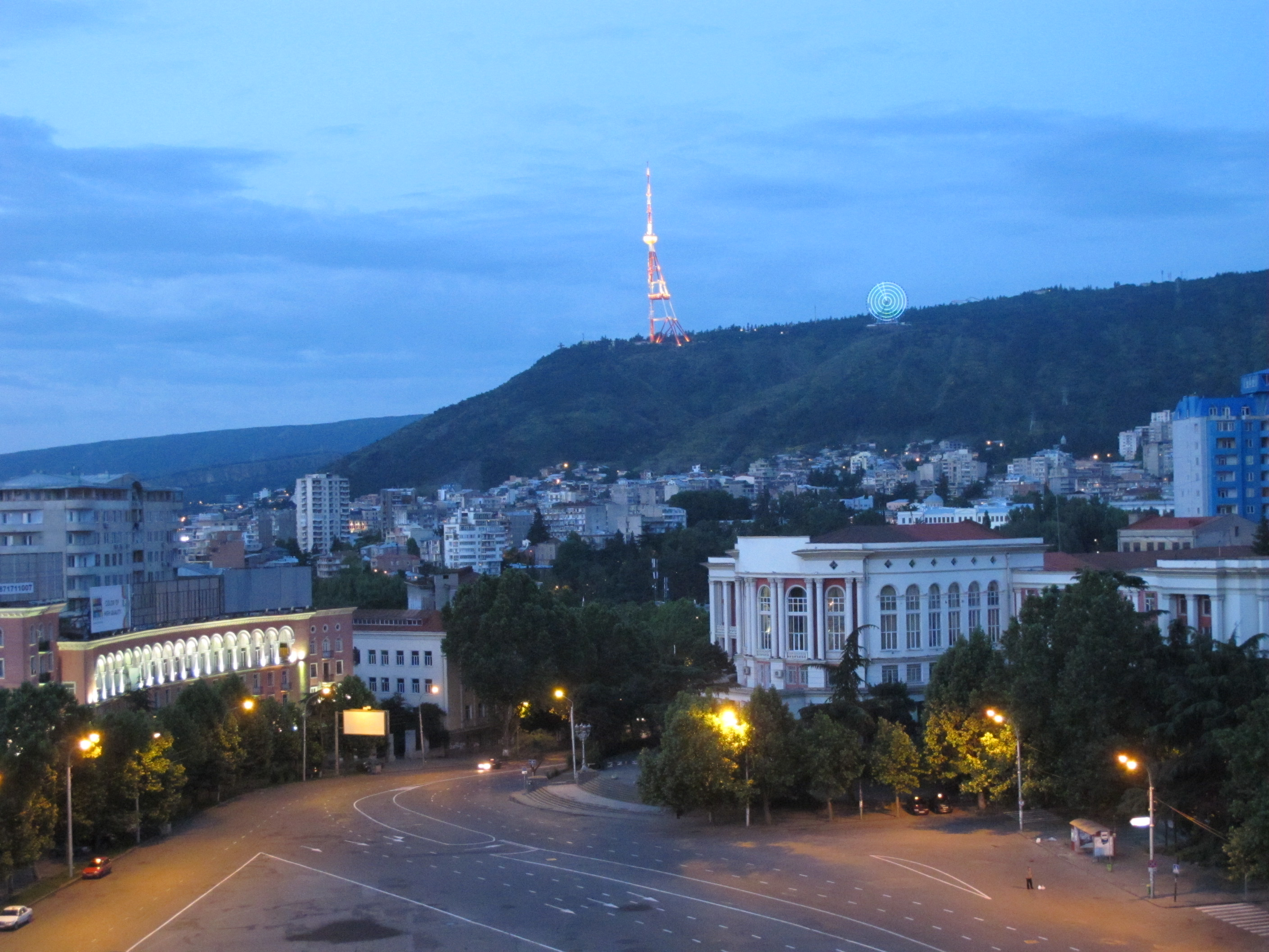 Перед рассветом в Тбилиси (вид на телебашню)